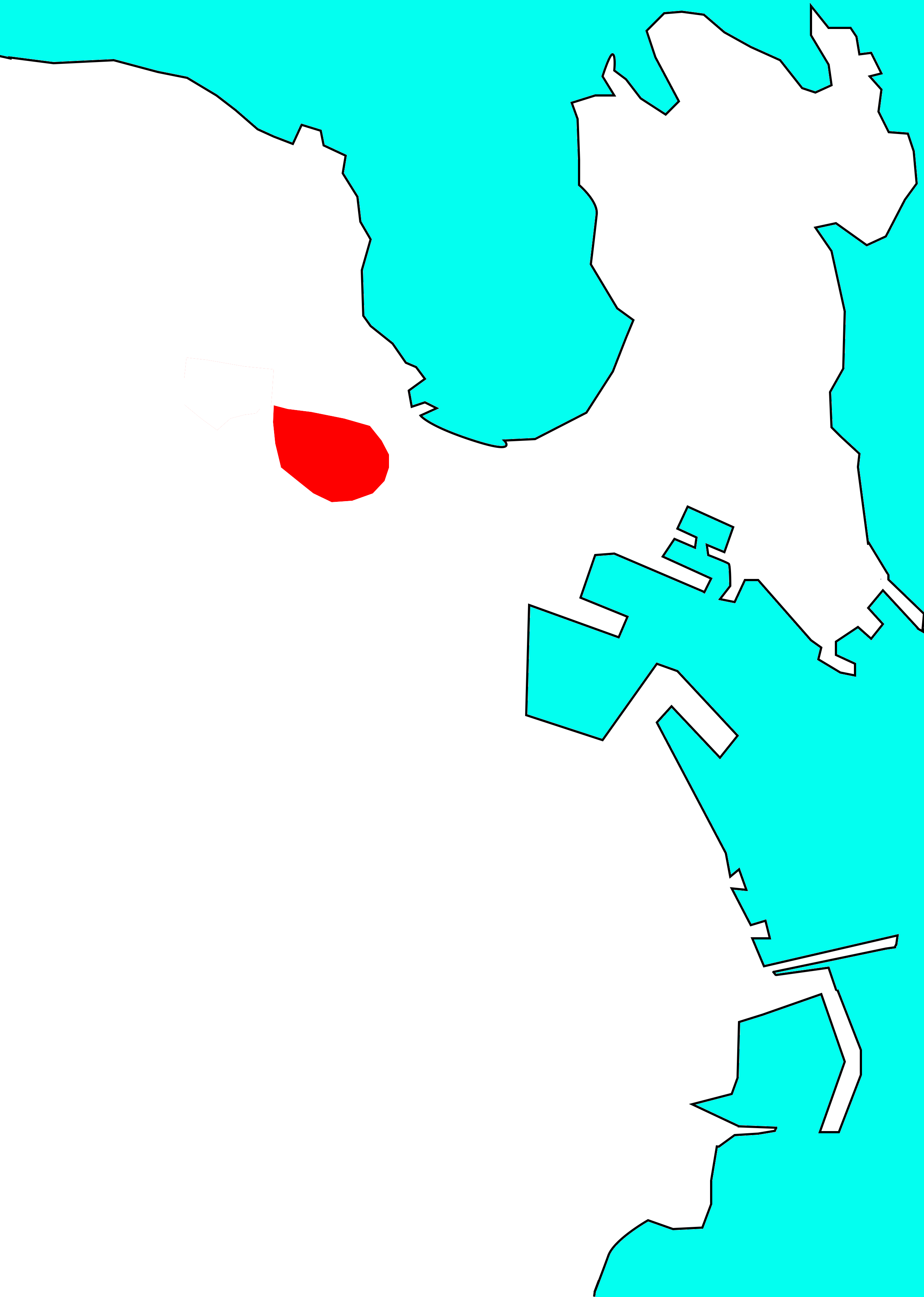 Situación da Cidade Xardín no concello da Coruña, segundo